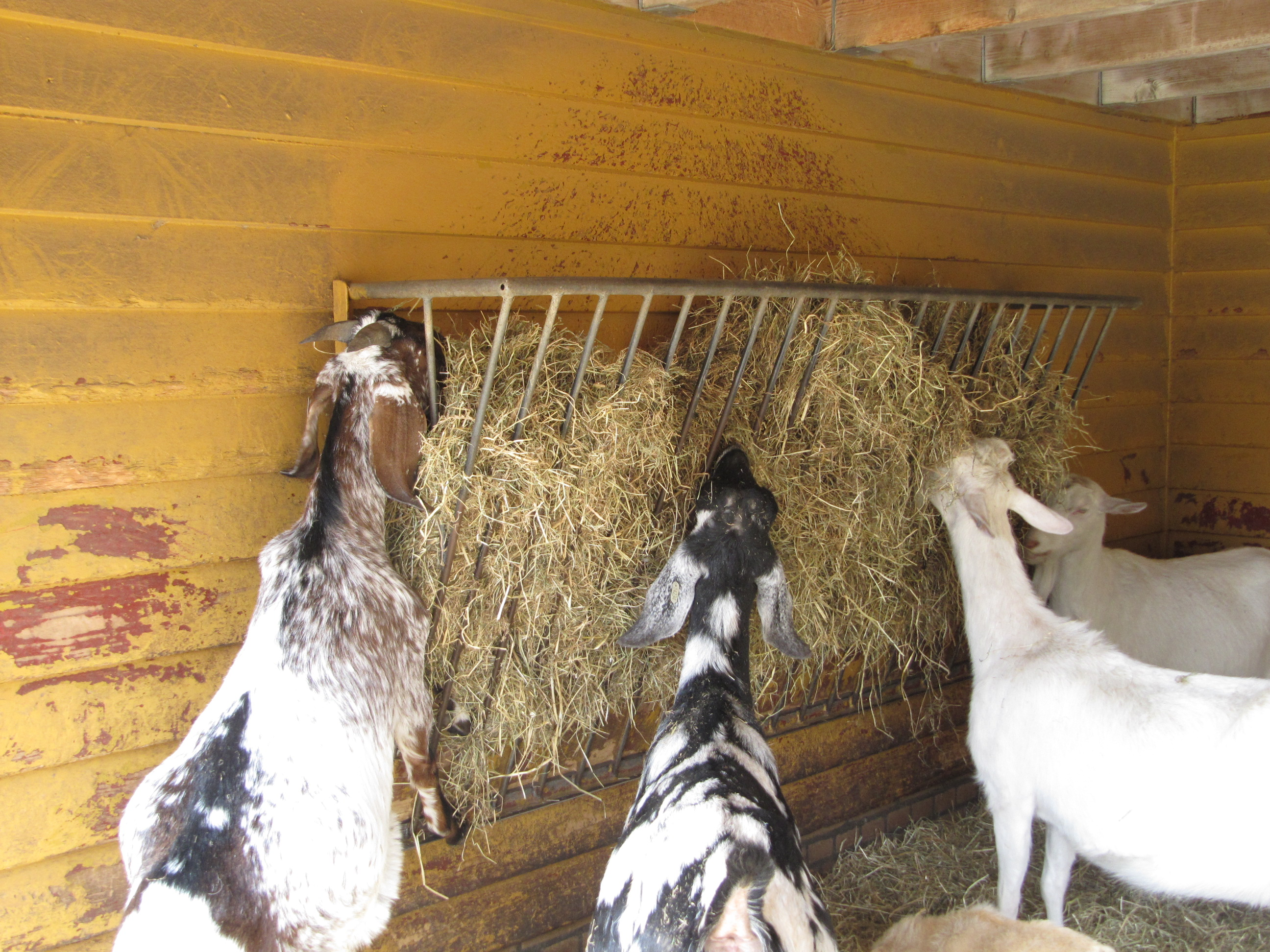 ruif kinderboerderij